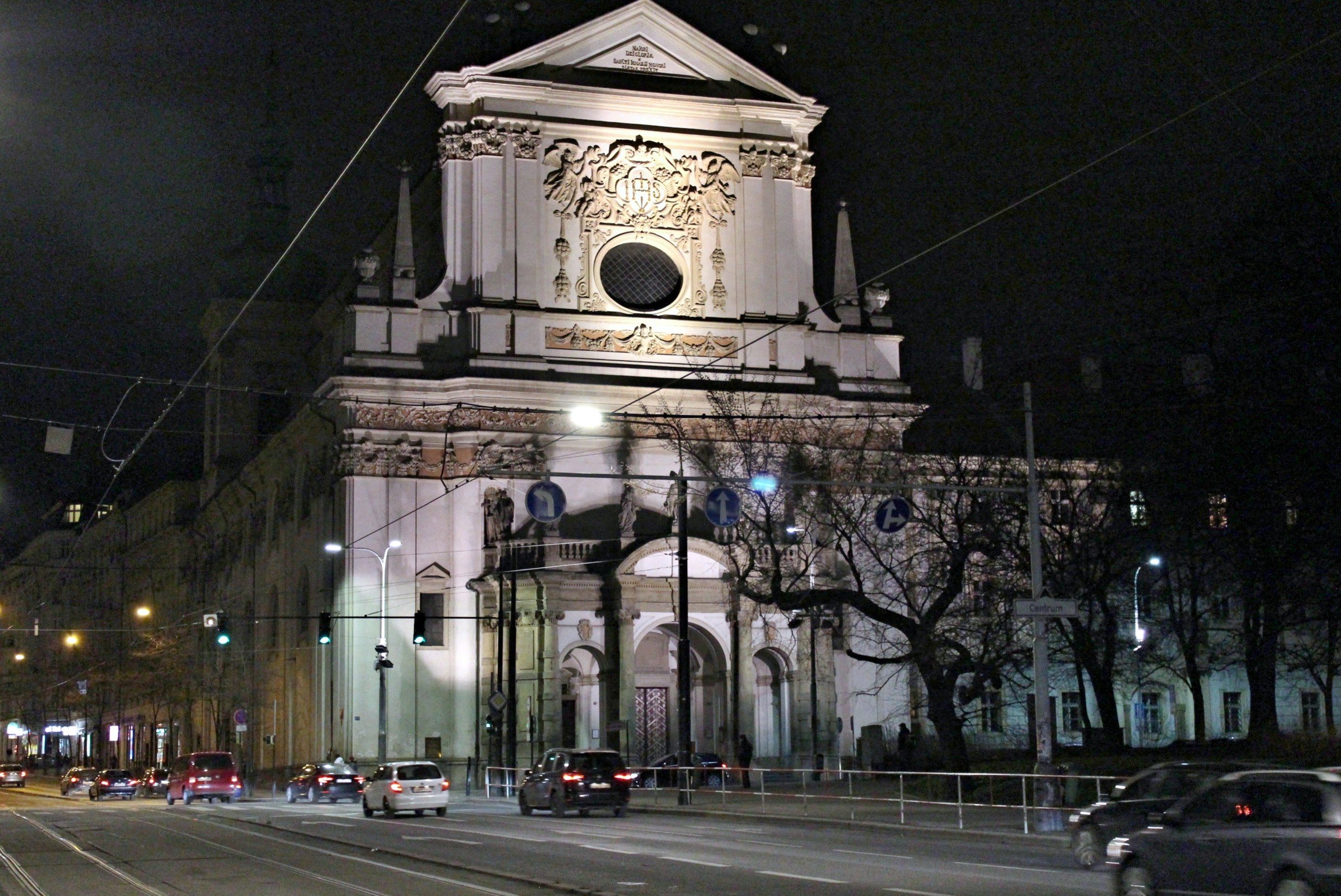 kostel sv. Ignáce